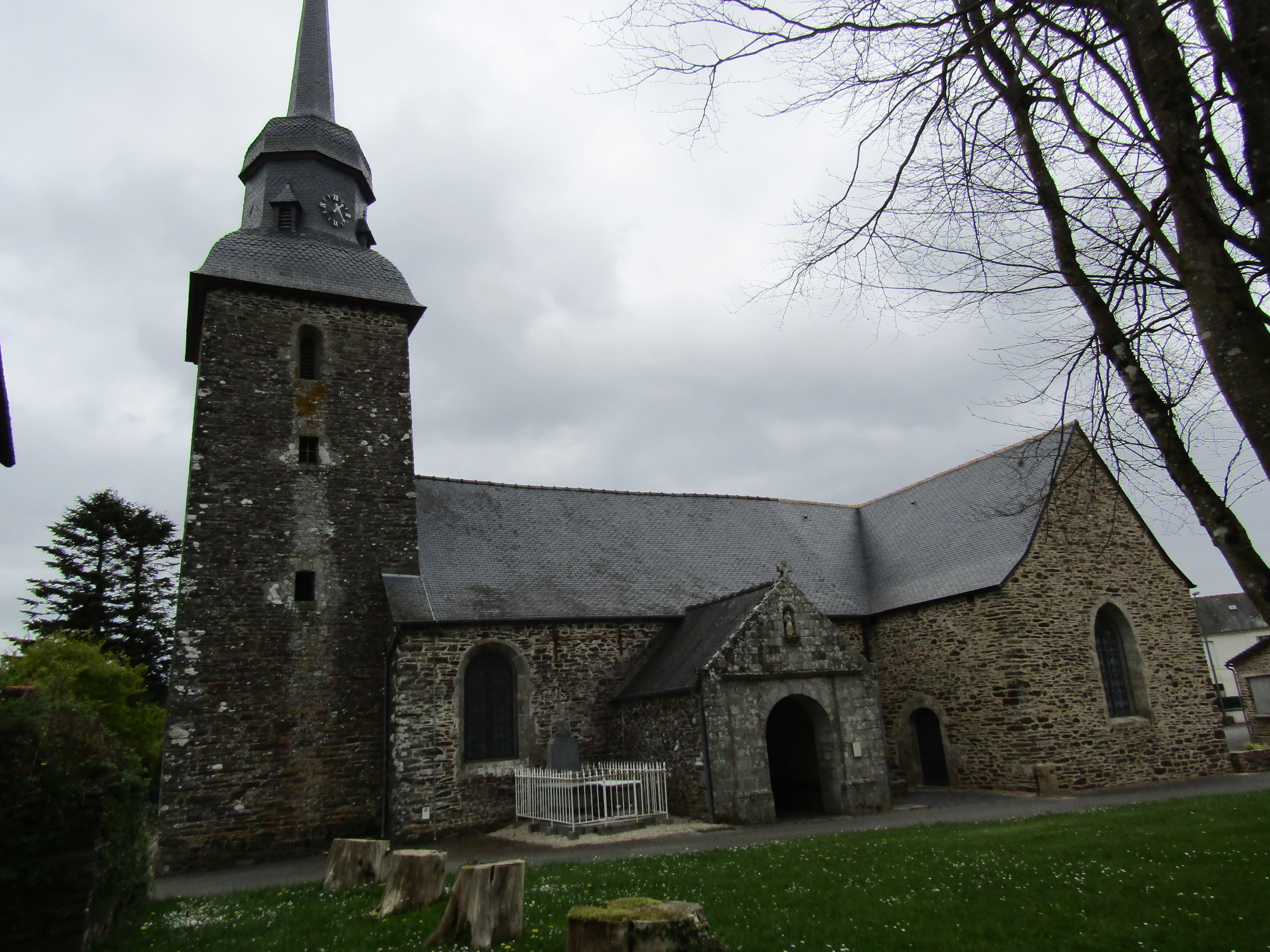 Eglise Saint-Hervé de Saint-Hervé